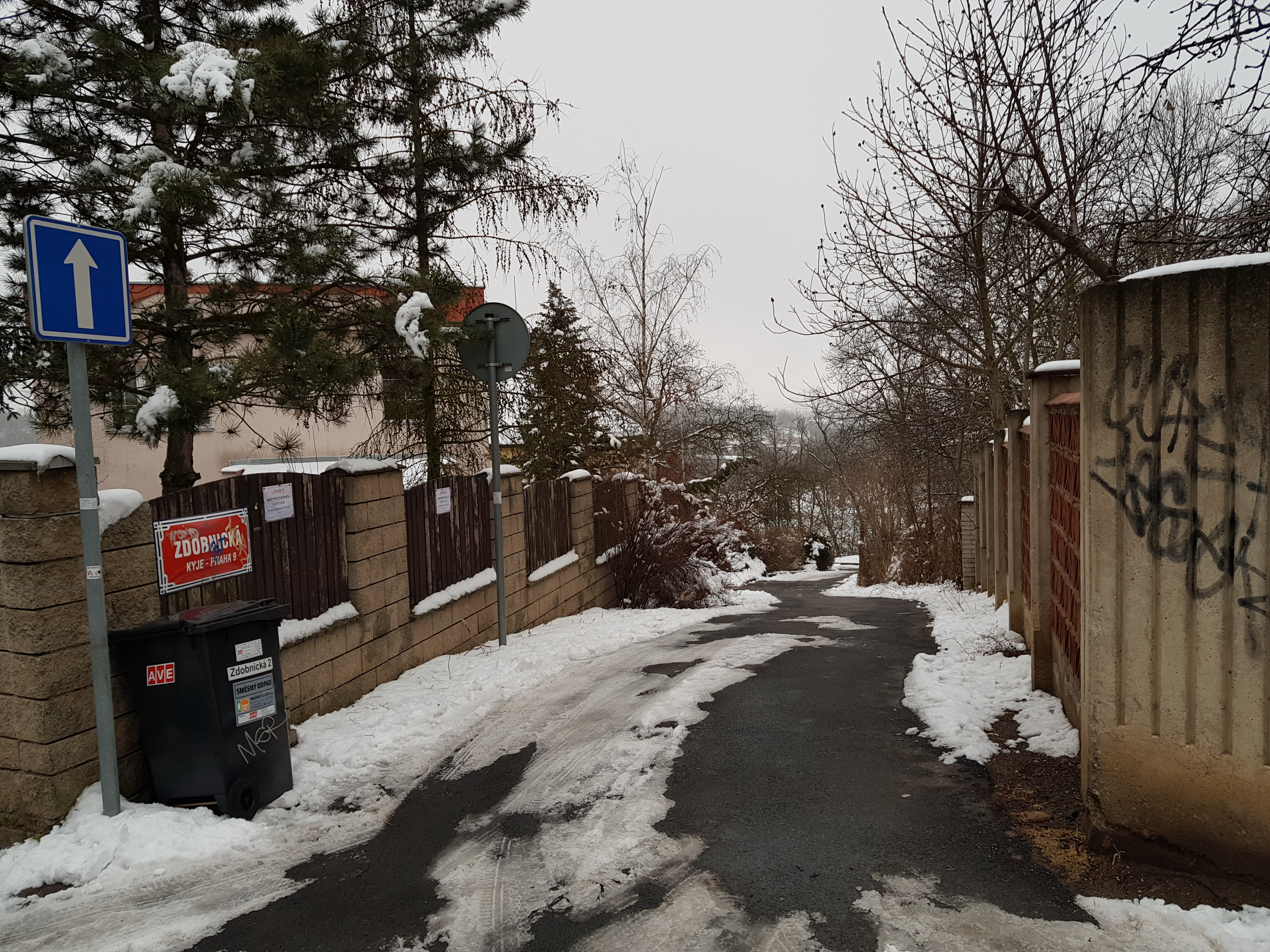 Zdobnická ulice, Praha 14, jižní úsek mezi Želivskou a Černičnou